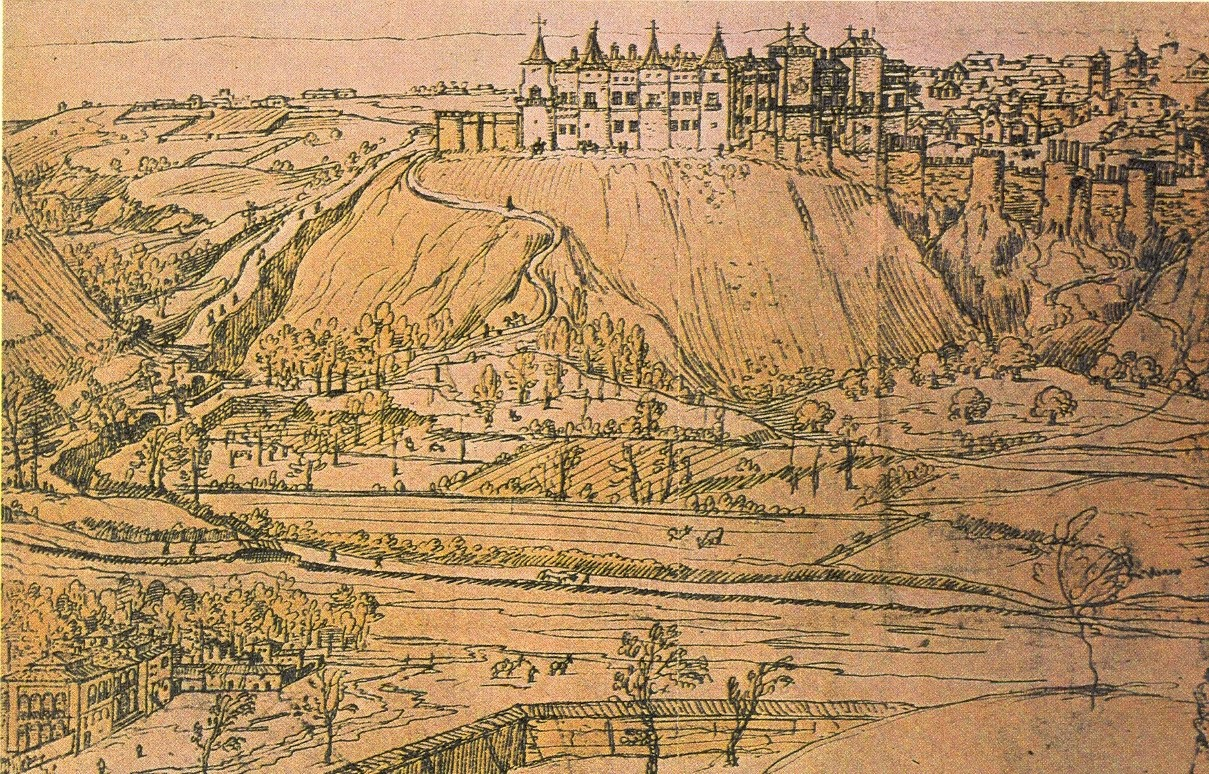 Vista de Madrid: dibujo preparatorio (1562) (detalle con el Real Alcázar de Madrid). Dibujo realizado a pluma con tinta sepia sobre lápiz negro en papel. Se conserva en la National-bibliothek de Viena (Ms. Min. 4178). El dibujo completo mide 365 x 1252 mm.